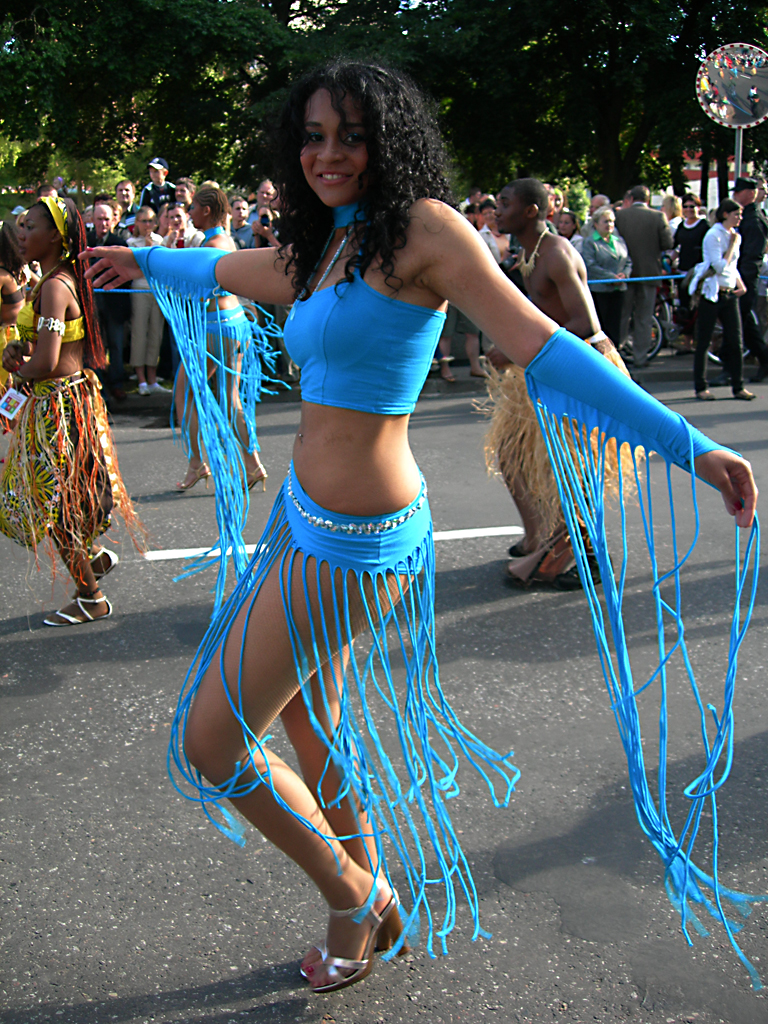 Samba dancer.